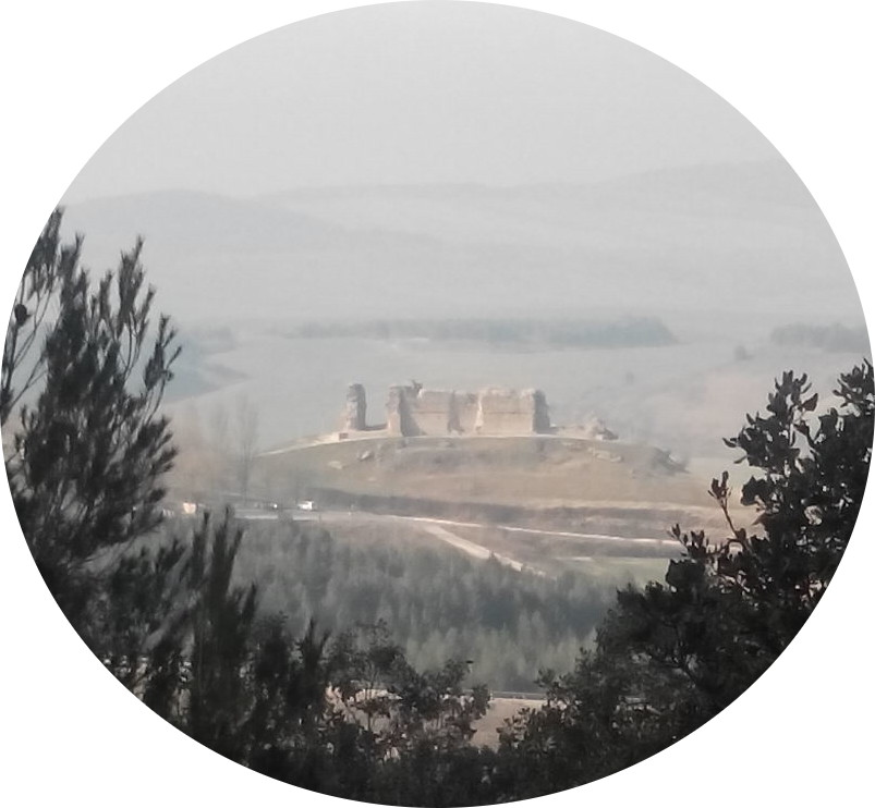 Tiebas - Vista de las ruinas desde la Sierra de Alaiz